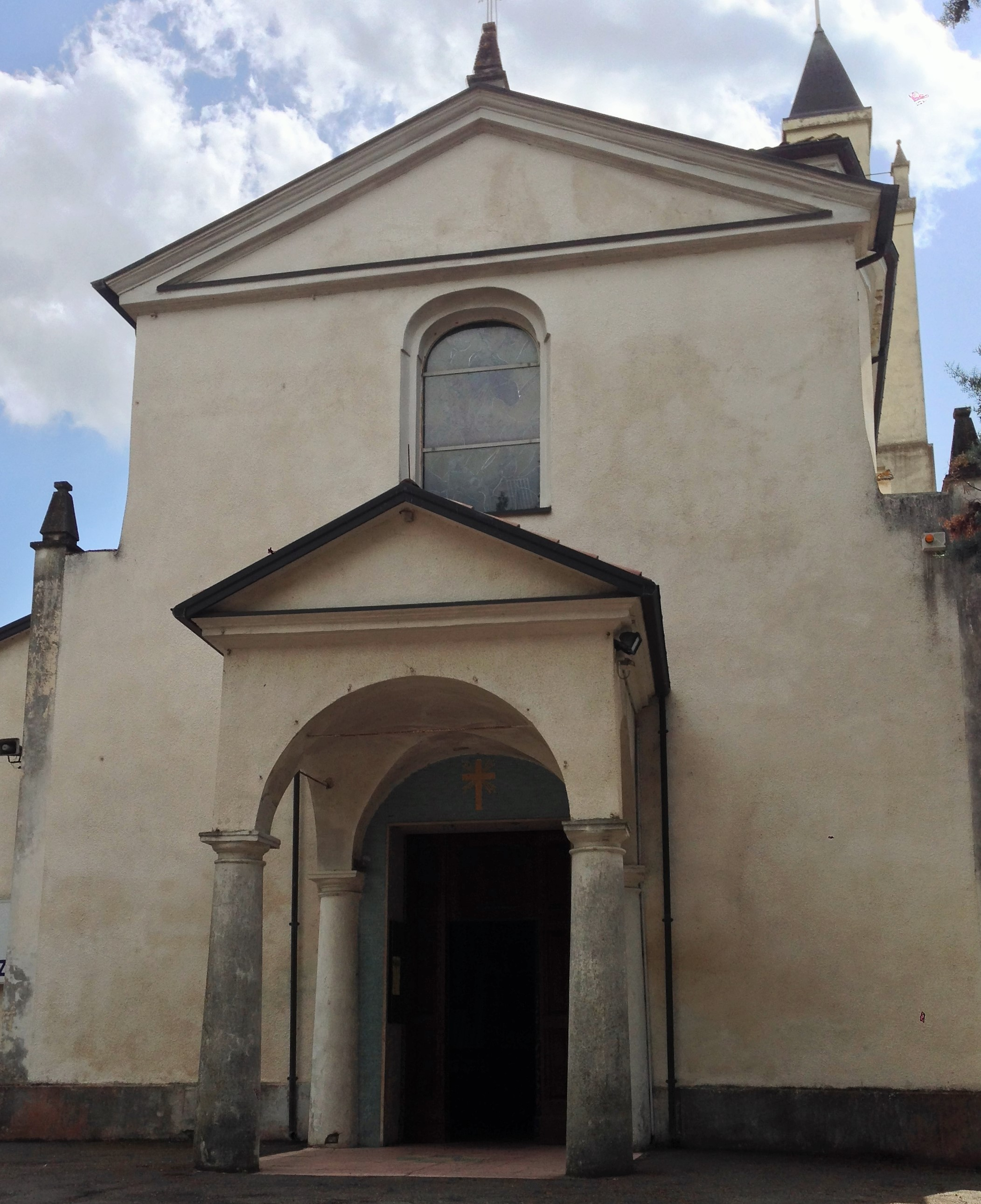 Iglesia en Cella